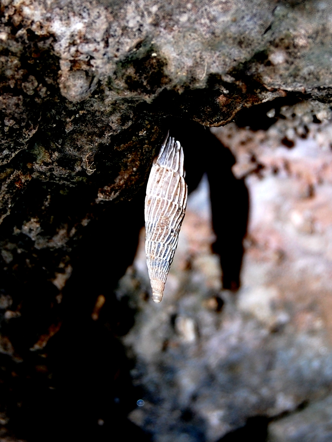 Siciliaria crassicostata - Riserva naturale Monte Cofano, Sicily